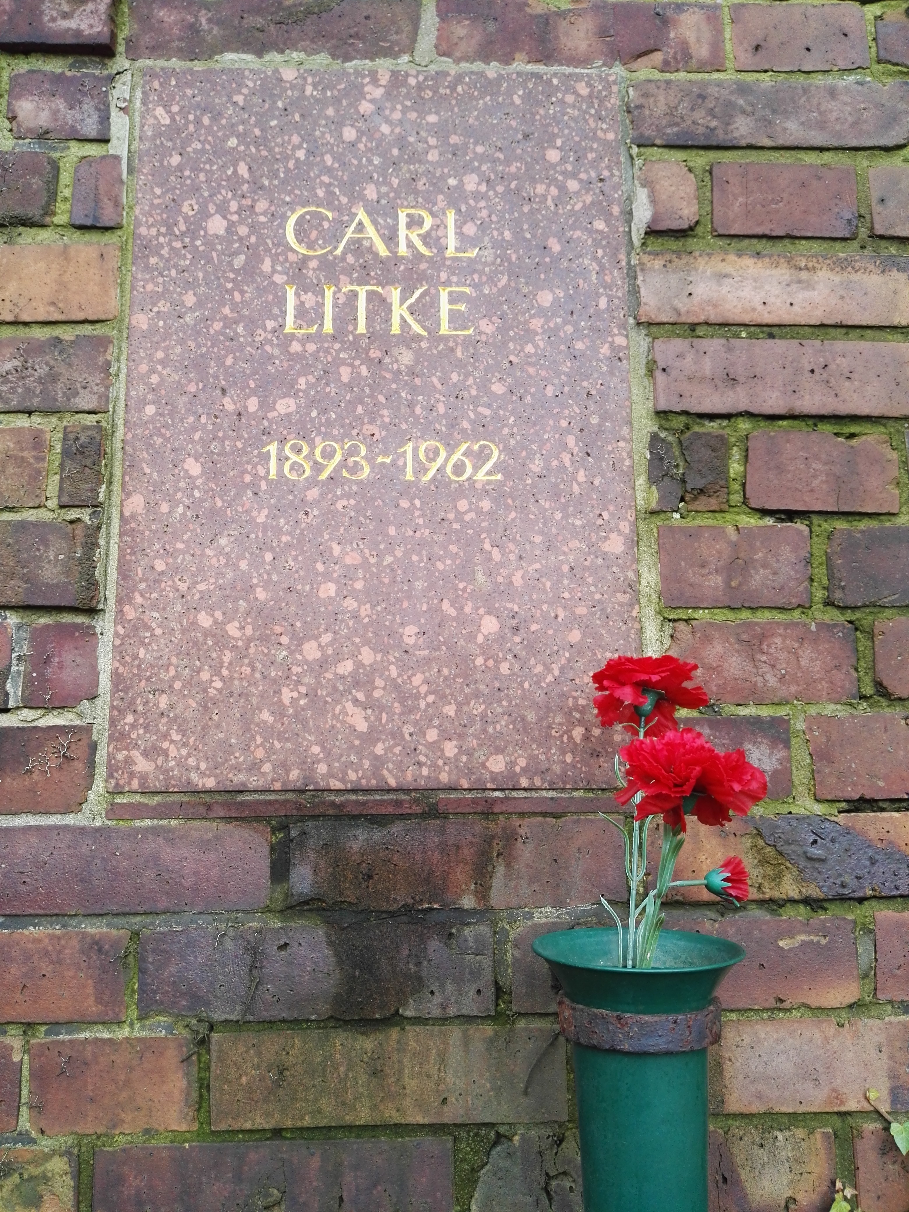 Grab von Karl Litke in der Gedenkstätte der Sozialisten auf dem Zentralfriedhof Friedrichsfelde in Berlin-Lichtenberg